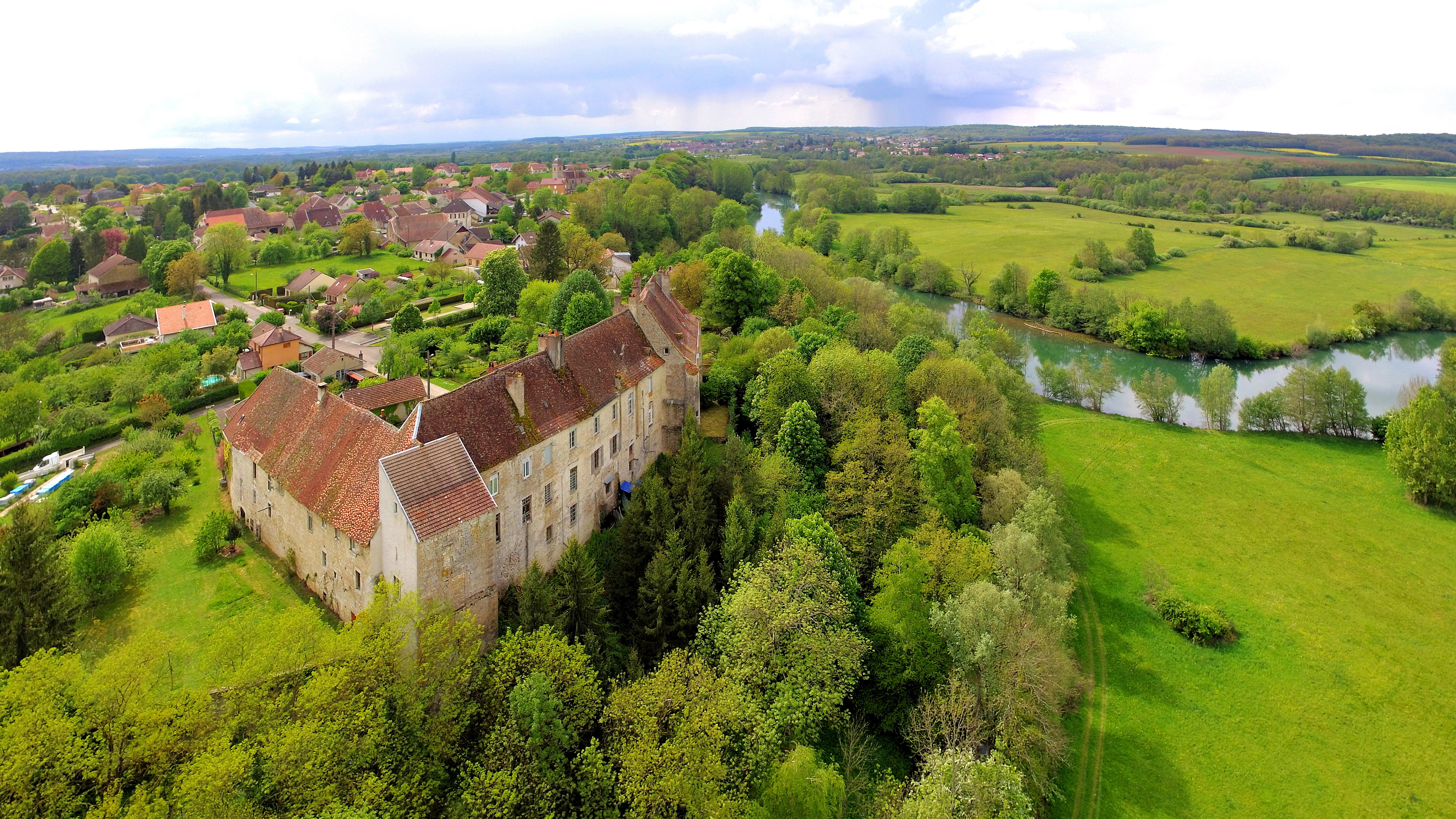 Le village et son château au bord de l'Ognon